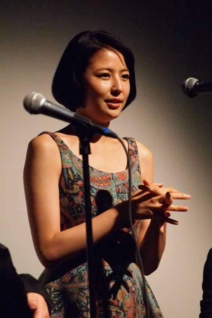 Masami Nagasawa @ Japan Cuts 2012 - 03